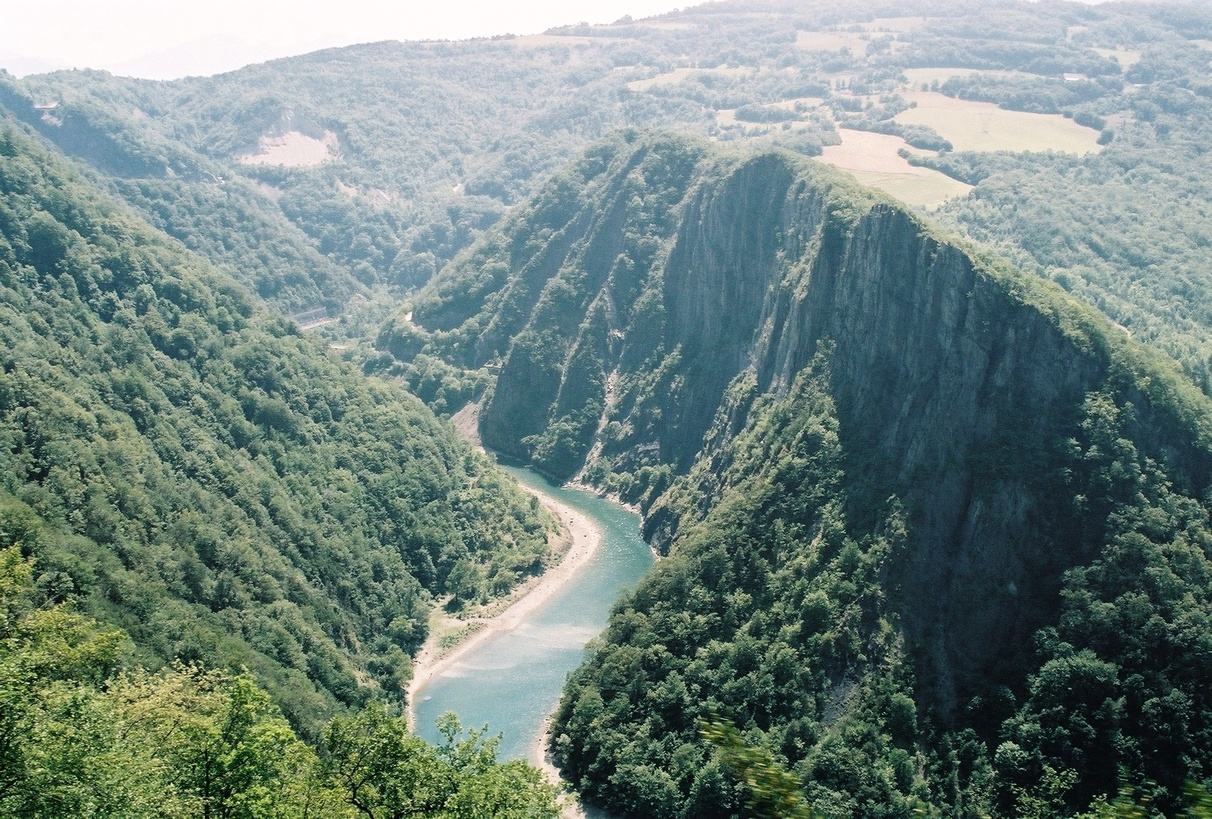 La vallée du Drac vue du train de la Mure